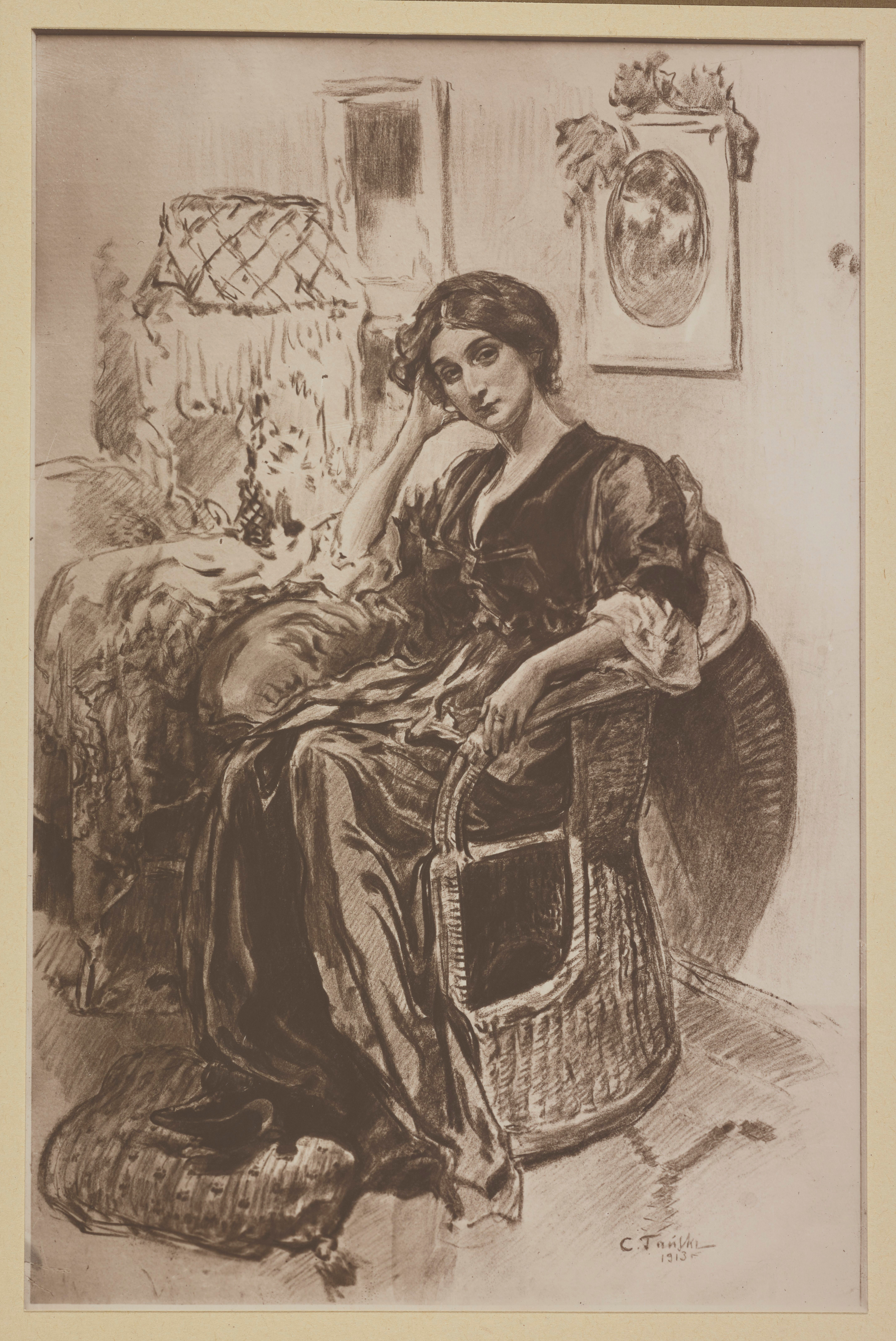 Kobieta w wiklinowym fotelu, obraz Czesława Tańskiego